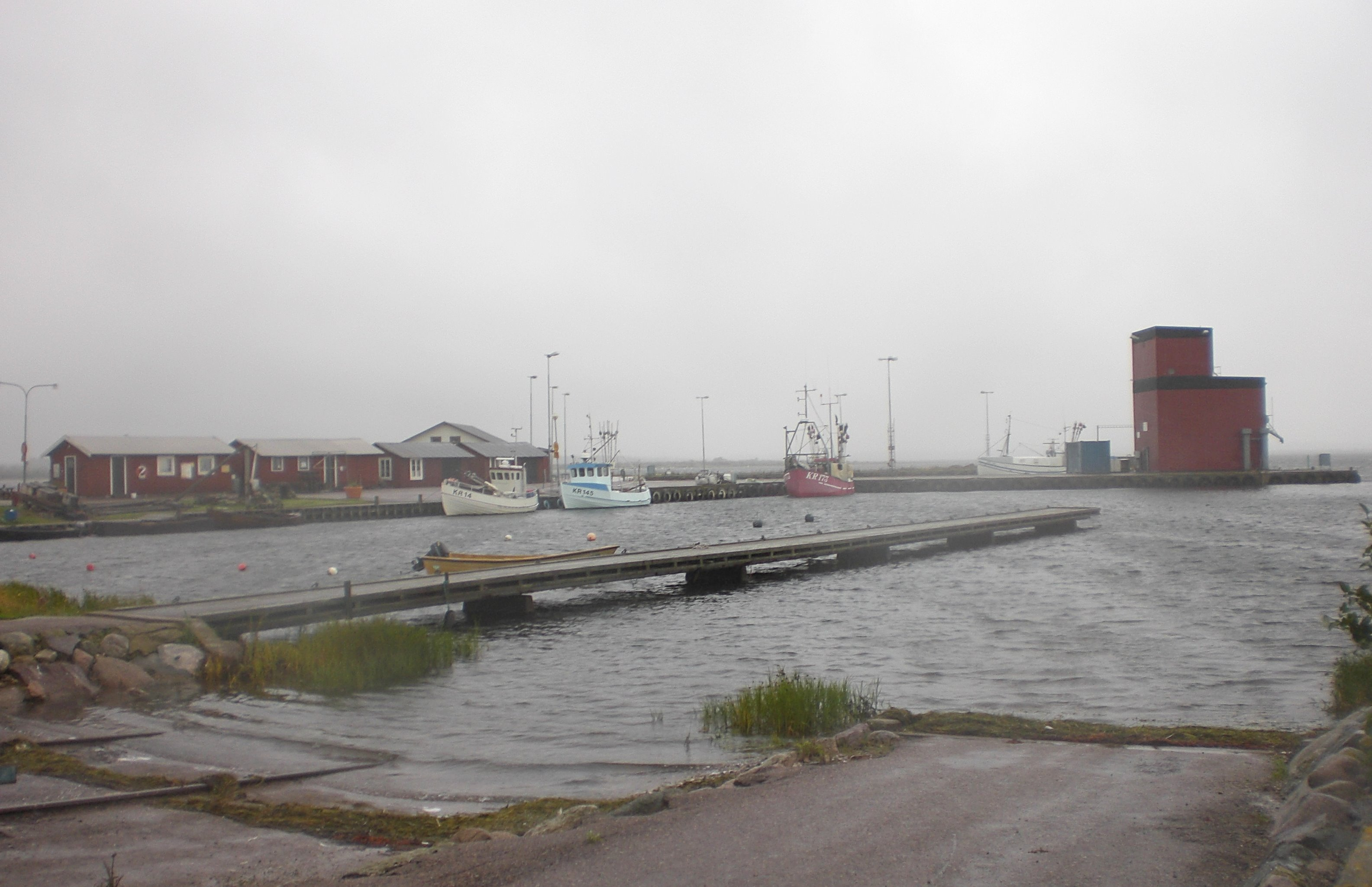 Hafen von Karehamn auf Öland, Schweden, Blick in Richtung Ostsee